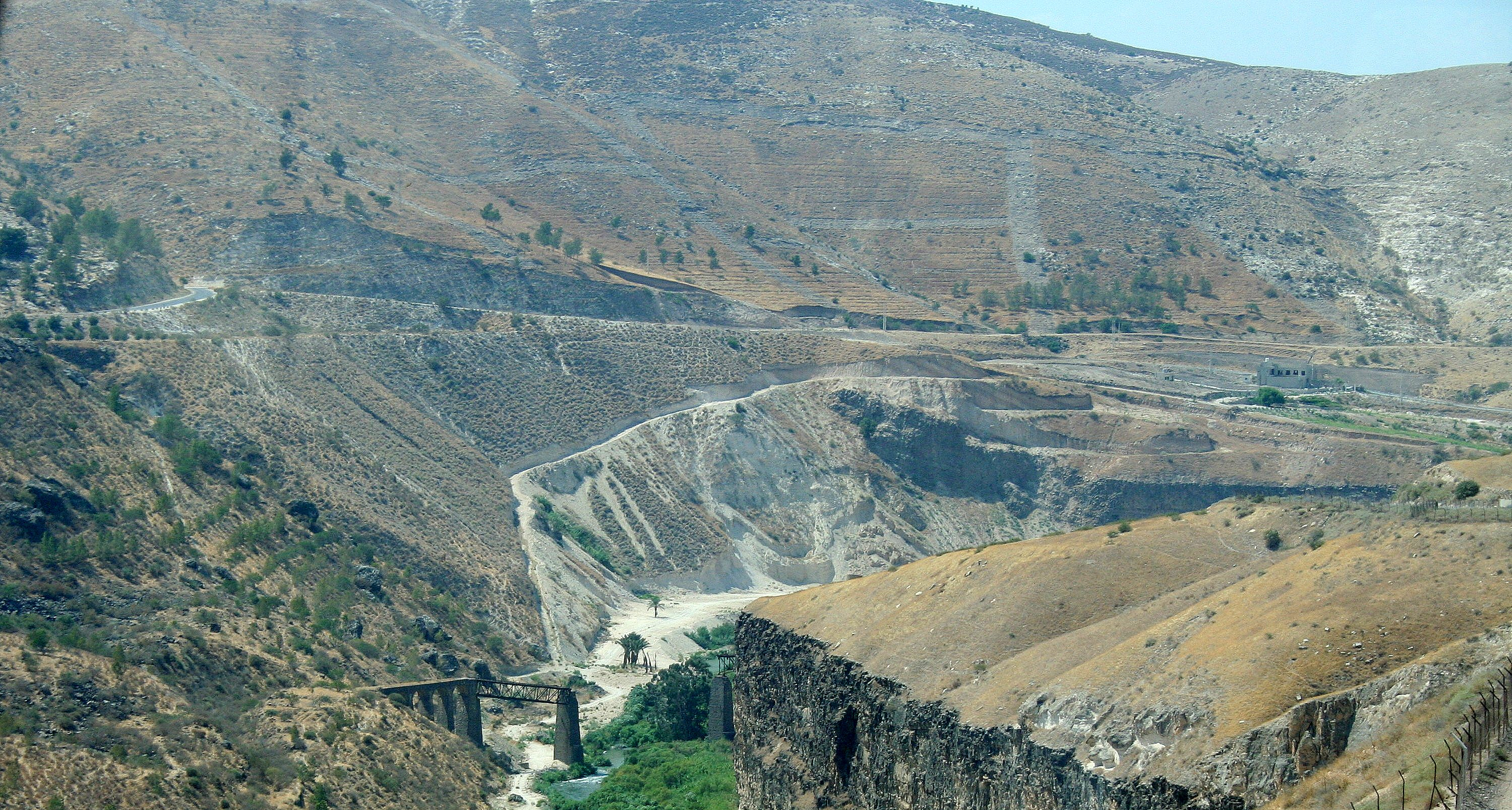 אפיק הירמוק עם תמונת גשר מסילת הברזל - אולי - פוצץ על ידי ההגנה בhe:ליל הגשרים. ההגנה ]פיצצה גשר אחד על הירמוך ולא בהכרח מדטבר בגשר זה. האישור: hi, I just saw your comment on my picture here: and you have my permission to upload it on the wiki page. Thanks, Dana